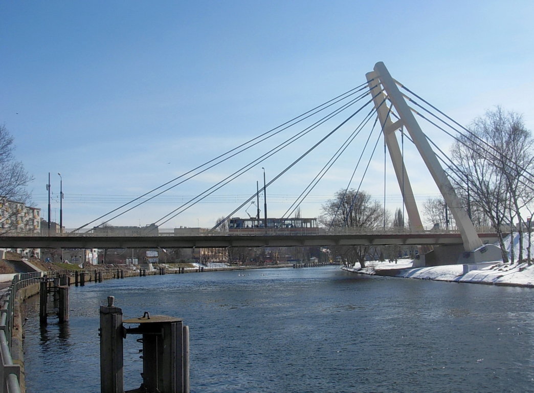 Most tramwajowy nad Brdą im. Władysława Jagiełły w Bydgoszczy